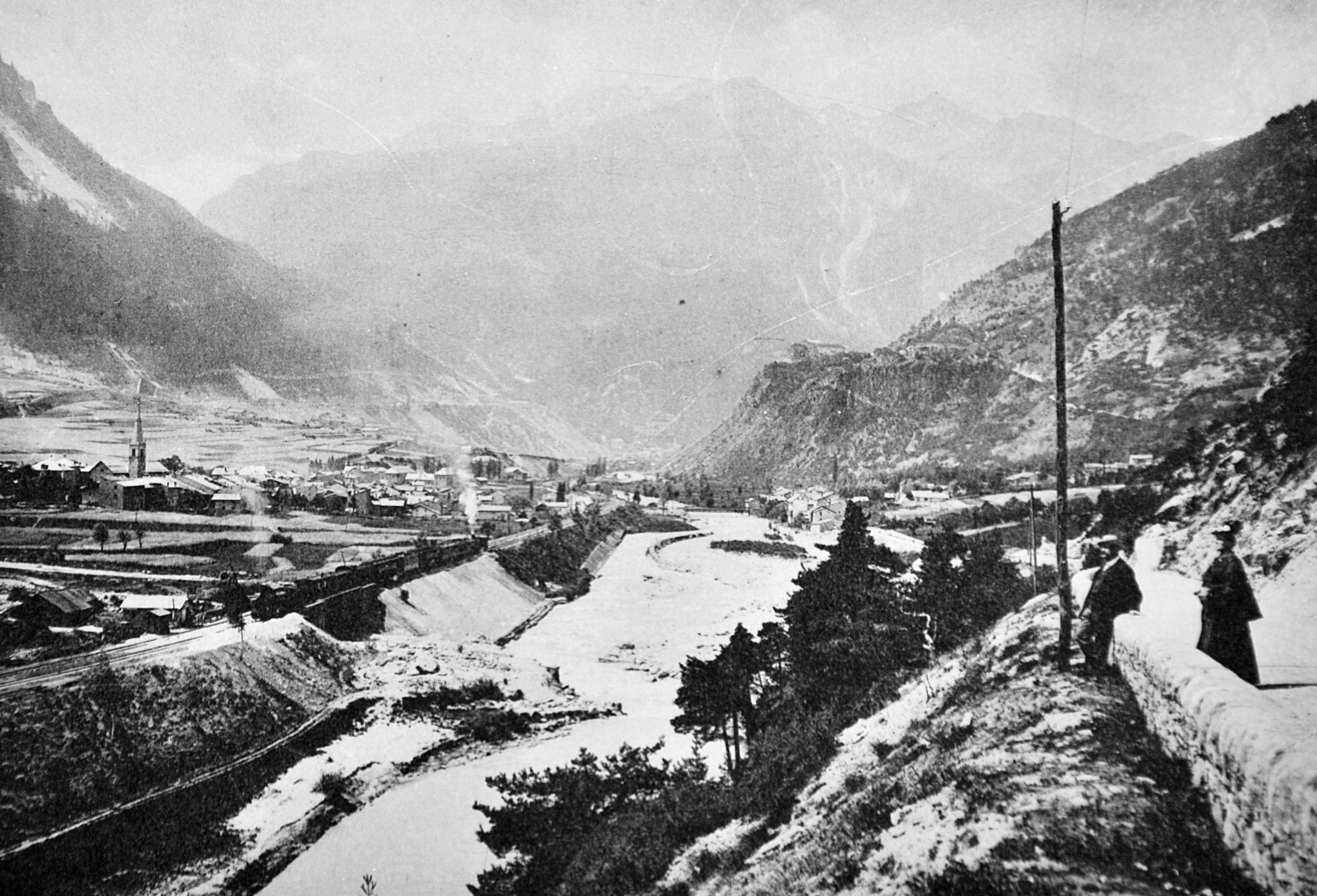 Cliché de Modane aux alentours du début du siècle. Extrait d'une brochure PLM sur le Mont-Cenis non datée (la mention « Imprimeries réunies de Nancy » sur le dos de la brochure donne à penser qu'il s'agit d'un cliché postérieur à la Première guerre mondiale). Comme la ligne de train n'est visiblement pas électrifiée, la photographie date d'avant 1930 (ergo : domaine public). Donc, autour des années 1920, vraisemblablement.